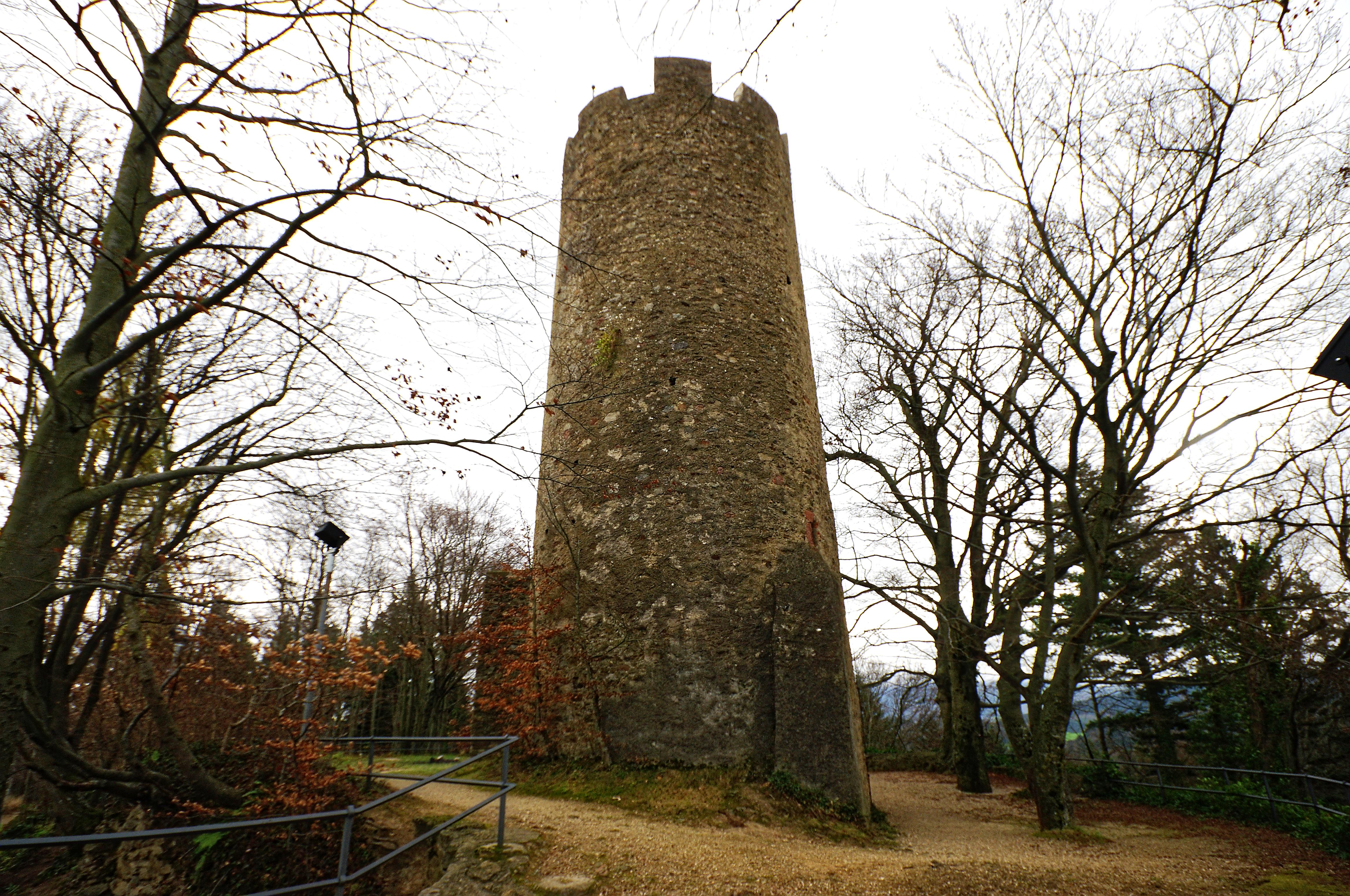 Die Rückseite